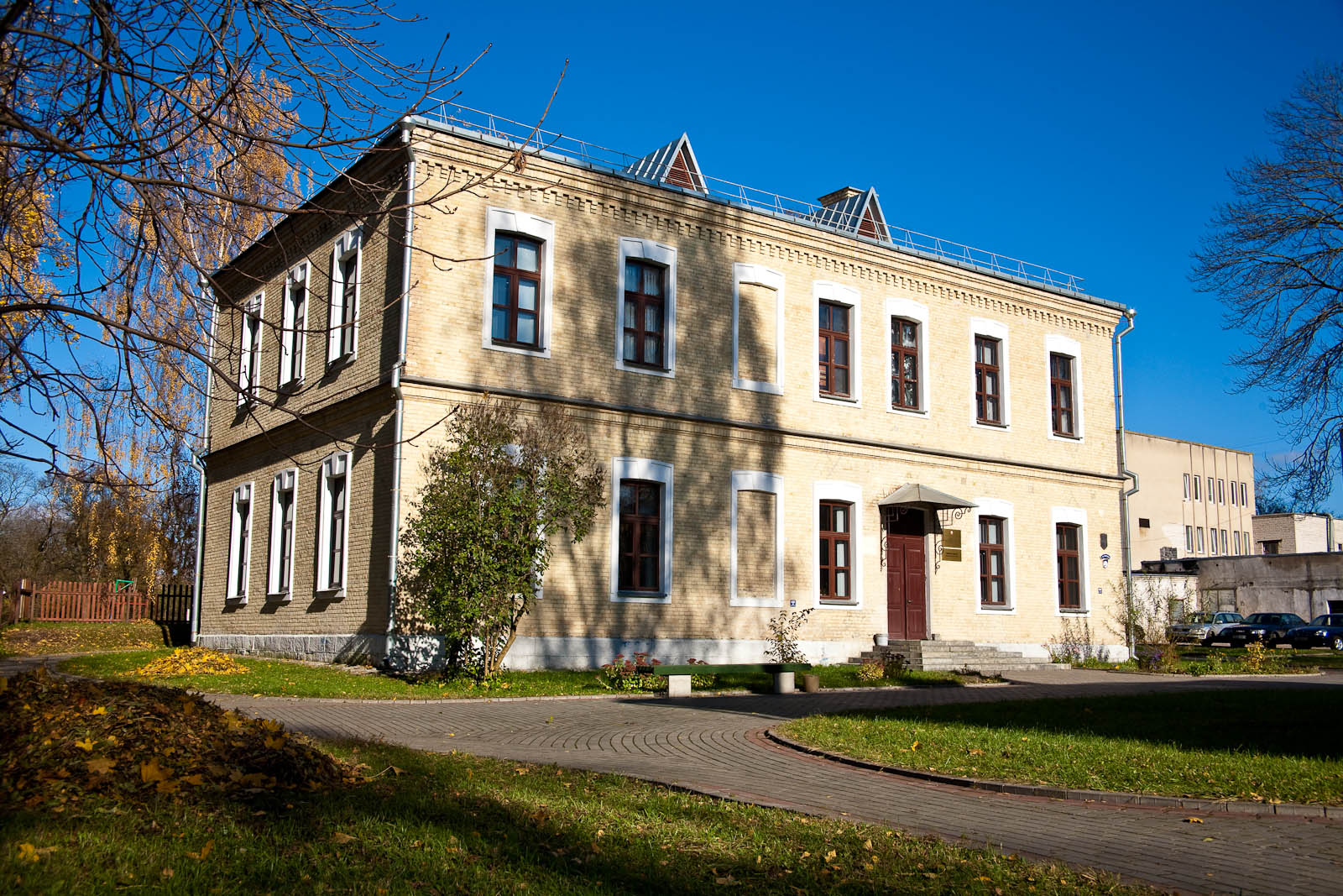 Здание №28 по ул. Дзержинского, Гродно, Беларусь. Здание является учебным корпусом №4 Гродненского Государственного Университета, в нём размещается Факультета искусств и дизайна. Здание входит в состав Исторического центра Гродно как историко-культурной ценности, находящейся в Государственном списке историко-культурных ценностей Республики Беларусь под номером 411Е000002. This is a photo of Belarusian heritage monument. Reference number: 411Е000002 ( WLM)